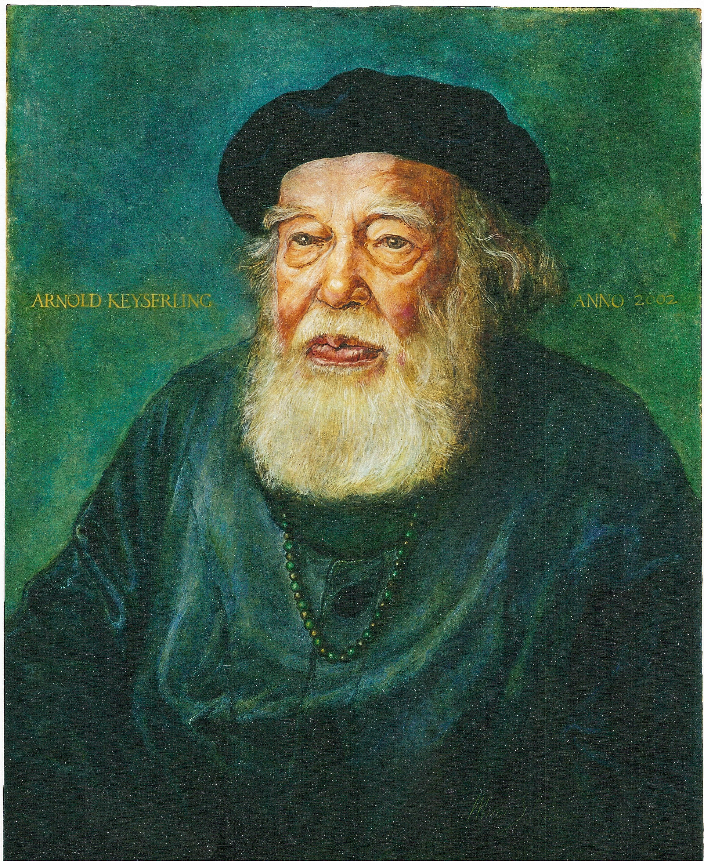 Portrait in Öl Arnold Keyserling von Mimi Staneva